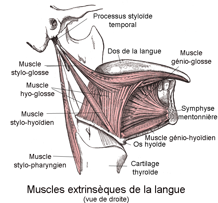 Muscles extrinsèques de la langue. Anatomie humaine